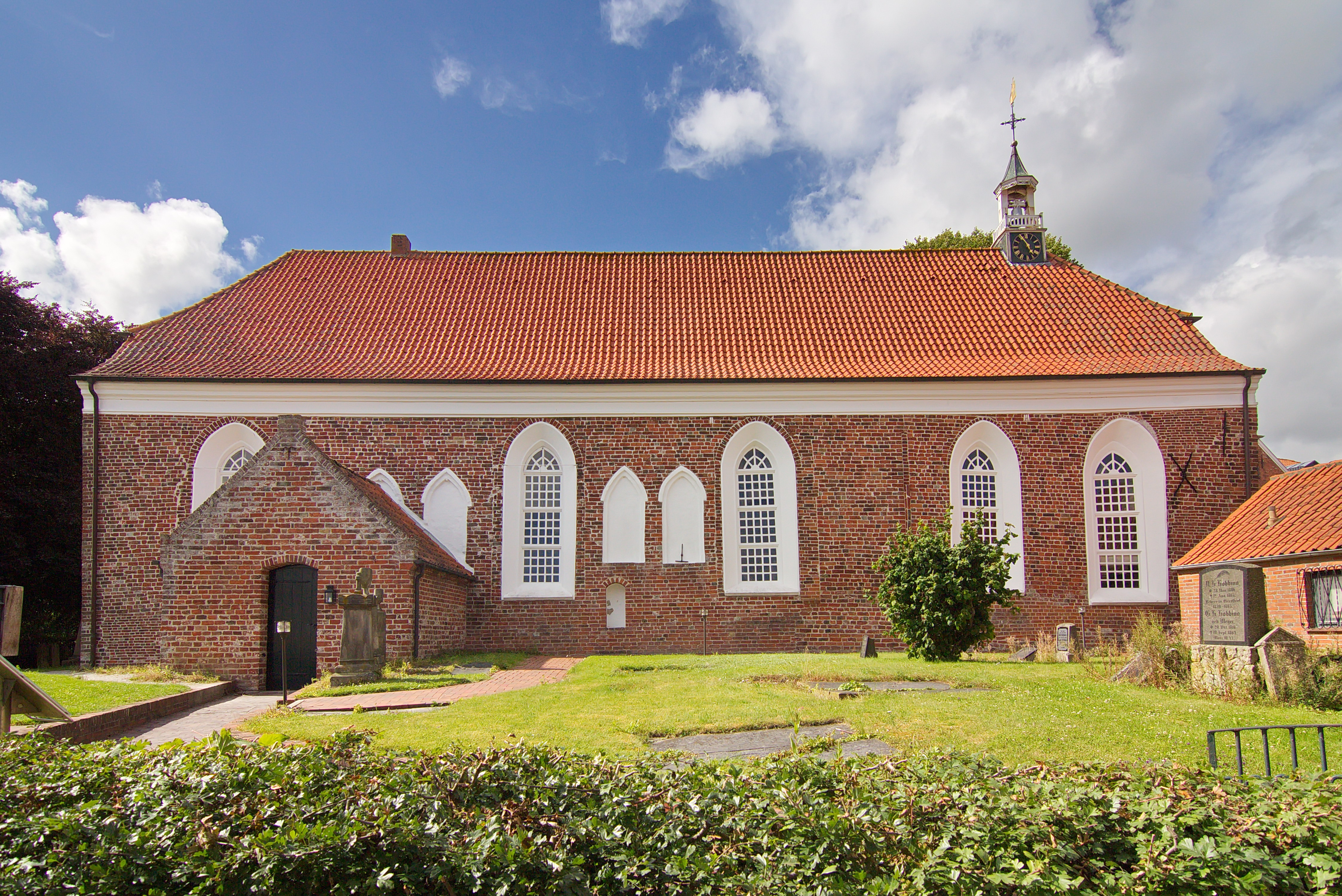 Evangelisch-reformierte Kirche Greetsiel (Krummhörn), Niedersachsen, Deutschland